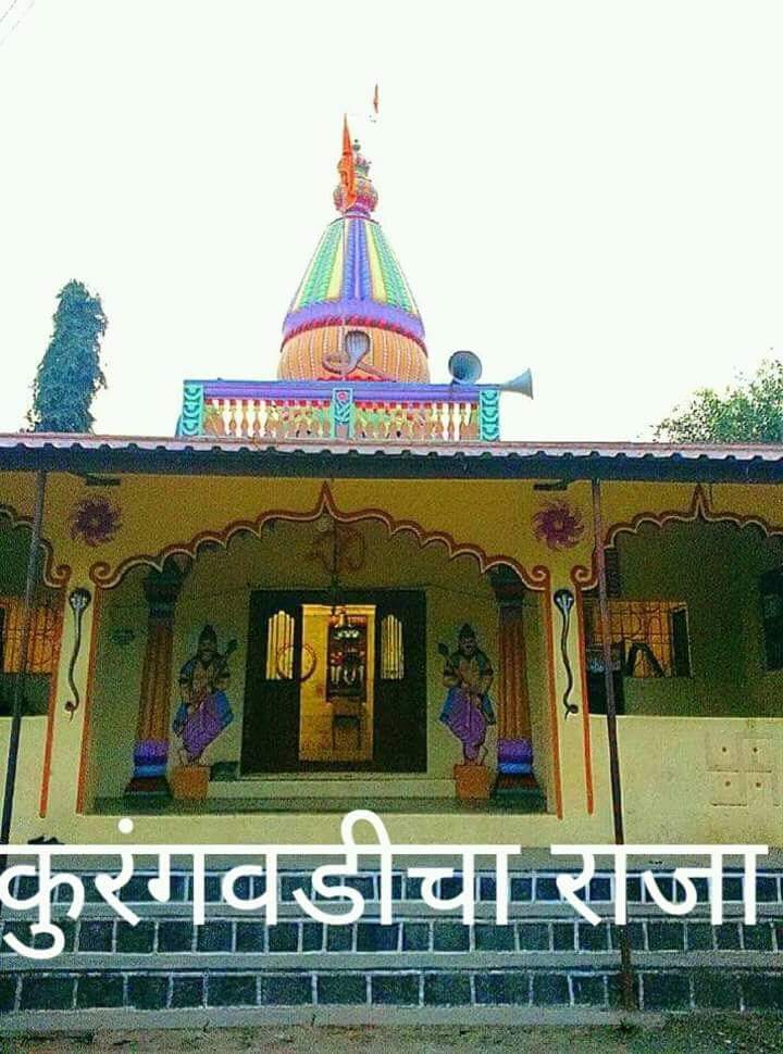 म्हातोबा हे ग्रामदेवत आहे